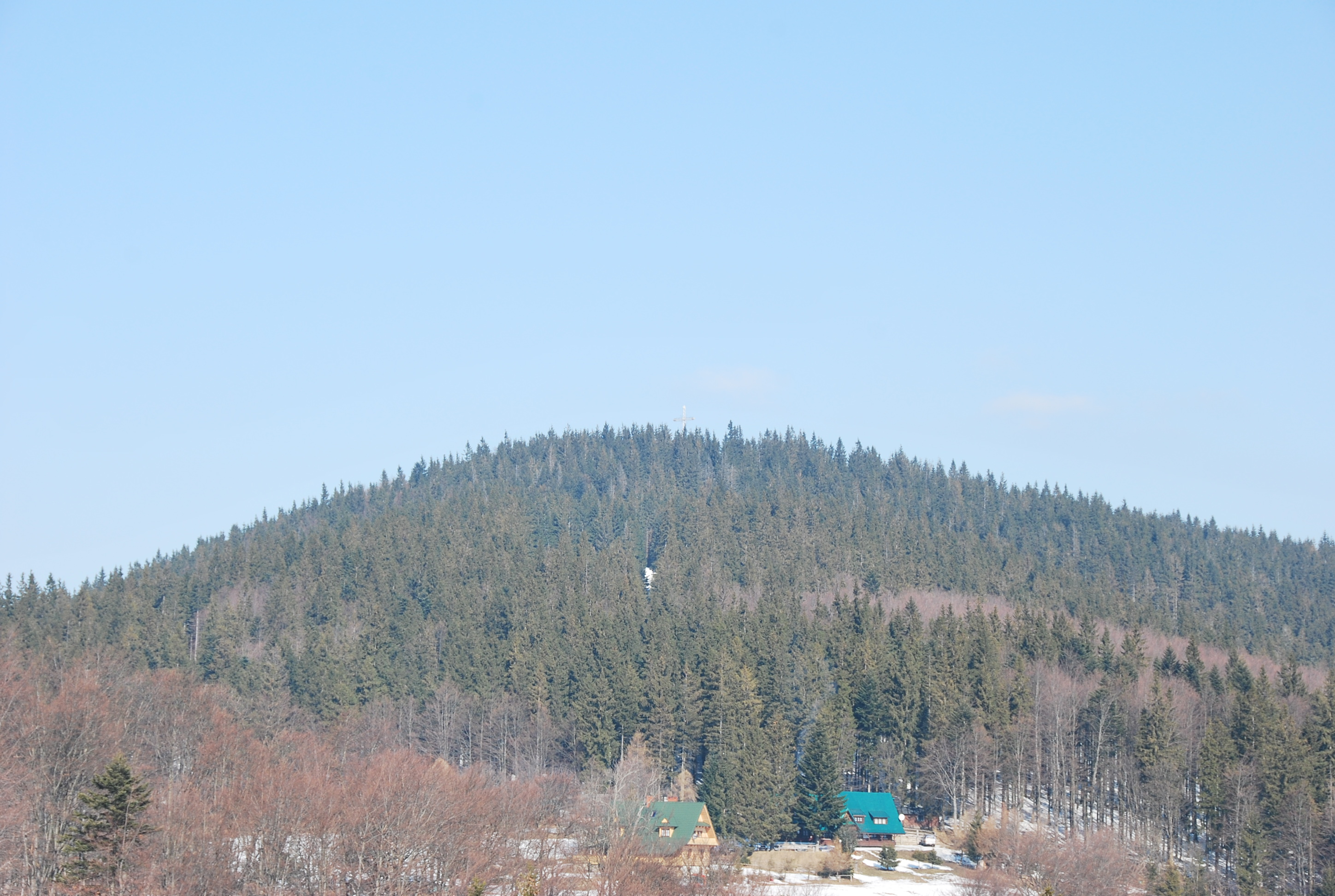 Widok na Bendoszkę Wielką z Przełęczy Przegibek.